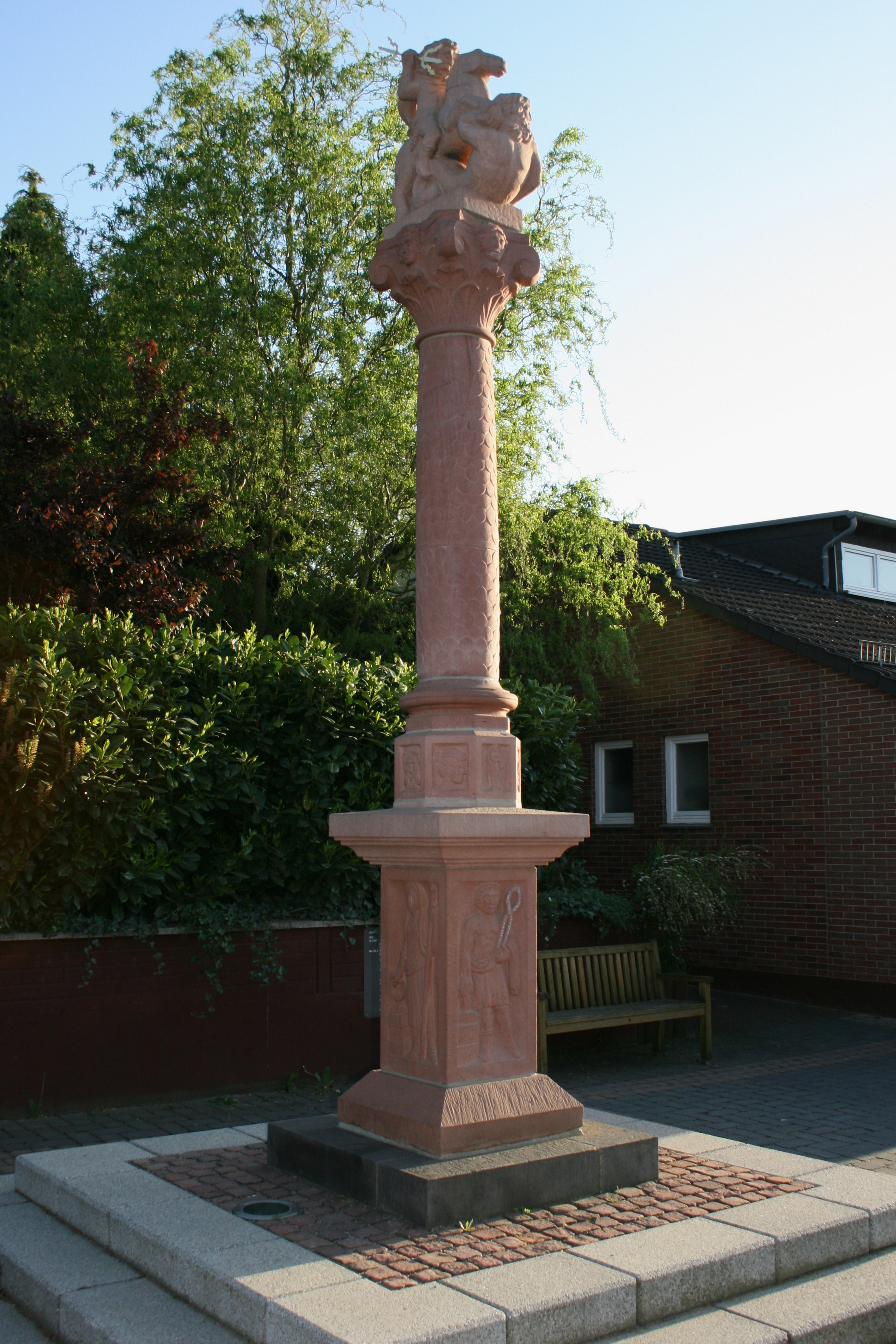 Nachbildung der in Bruchköbel-Butterstadt gefundenen Jupitergigantensäule, Aufstellung im Ort 2008.